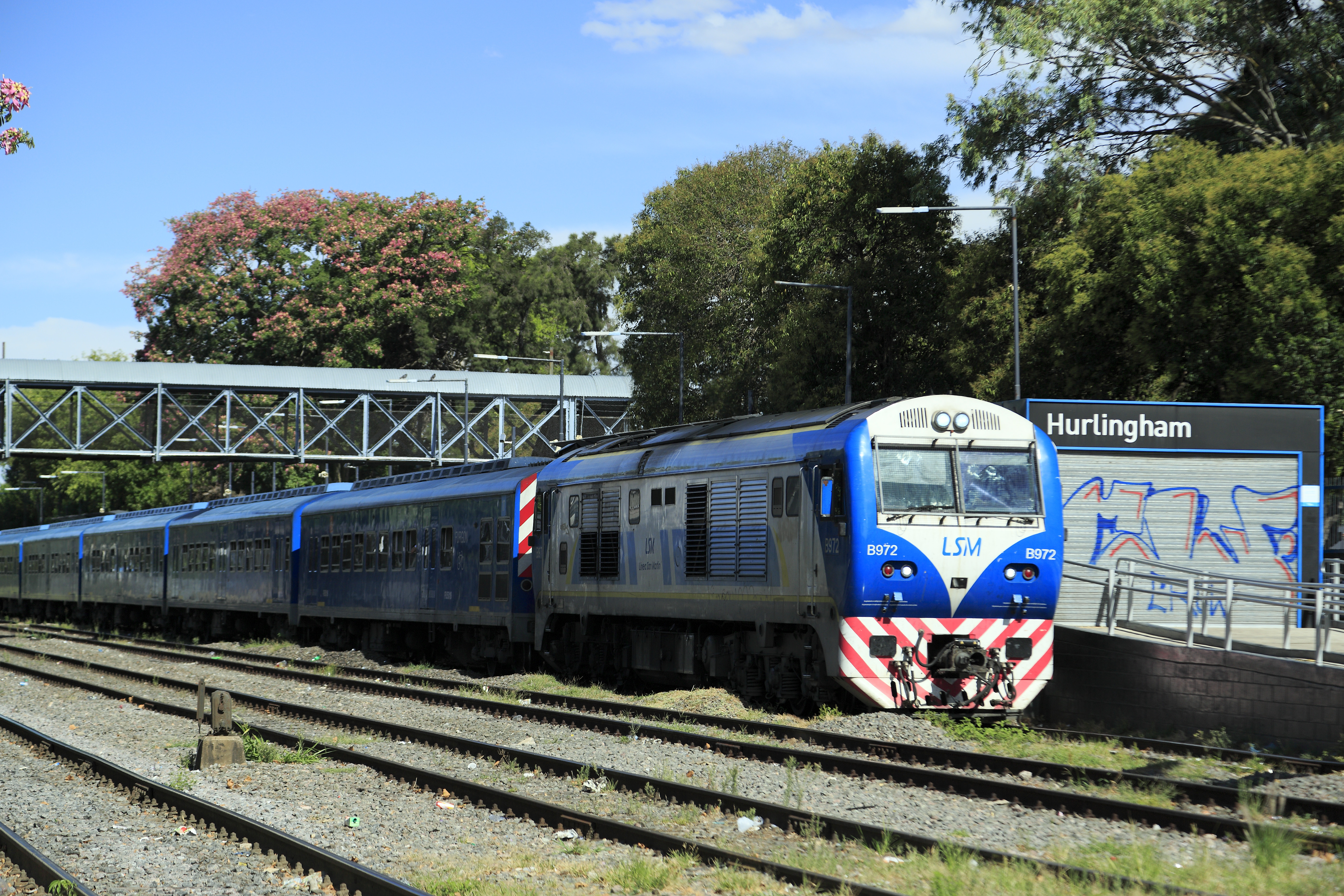 Personenzug Villa del Parque – Doctor Cabred, obwohl die Línea San Martín als einzige Breitspurstrecke bis in das Zentrum von Buenos Aires nicht elektrifiziert ist, wird trotzdem ein S-Bahn-Betrieb durchgeführt. Mit der Einführung der neuen Wagen wurden die Bahnsteige für einen stufenlosen Einstieg auf Wagenbodenhöhe gebracht.